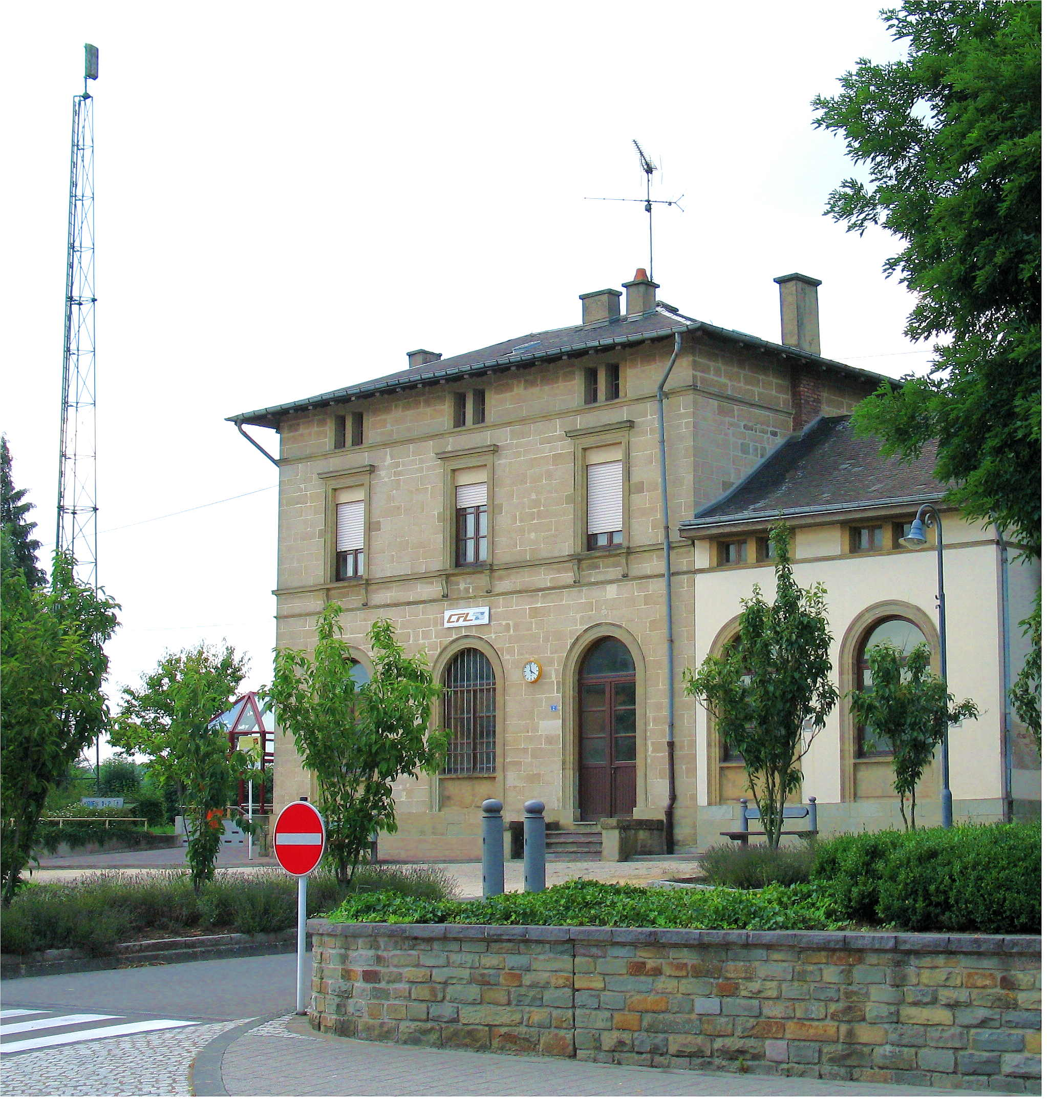 Sujet : Gare vu Wecker. Wecker Gare Wecker